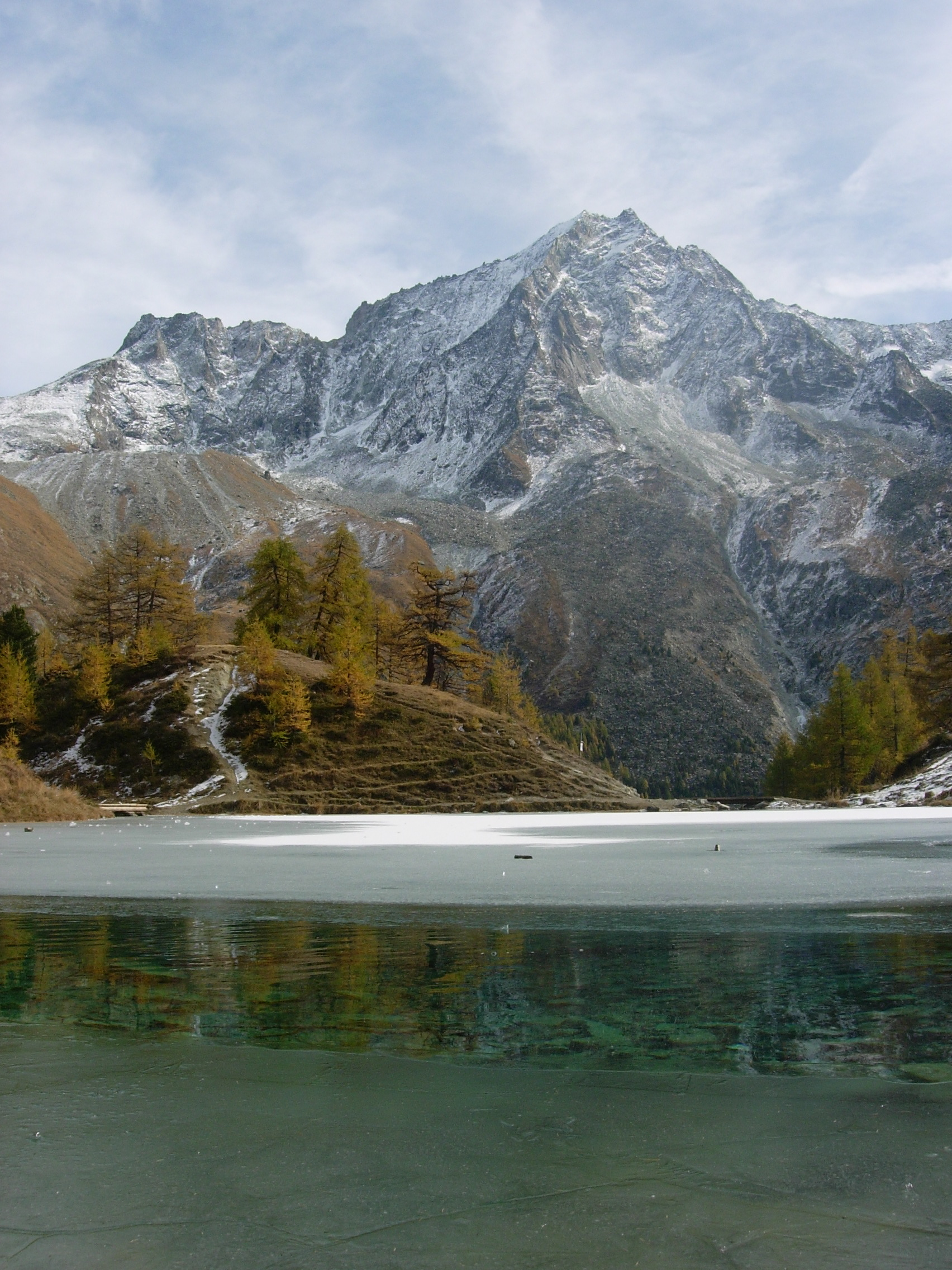 Val d'Hérens, la Dent de Perroc vue depuis le lac Bleu.